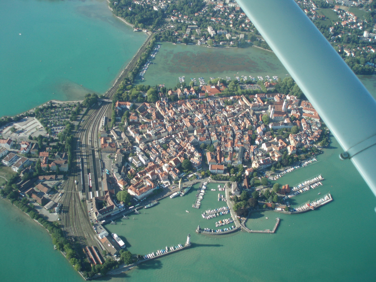 Die Insel Lindau aus einer Höhe von 900m